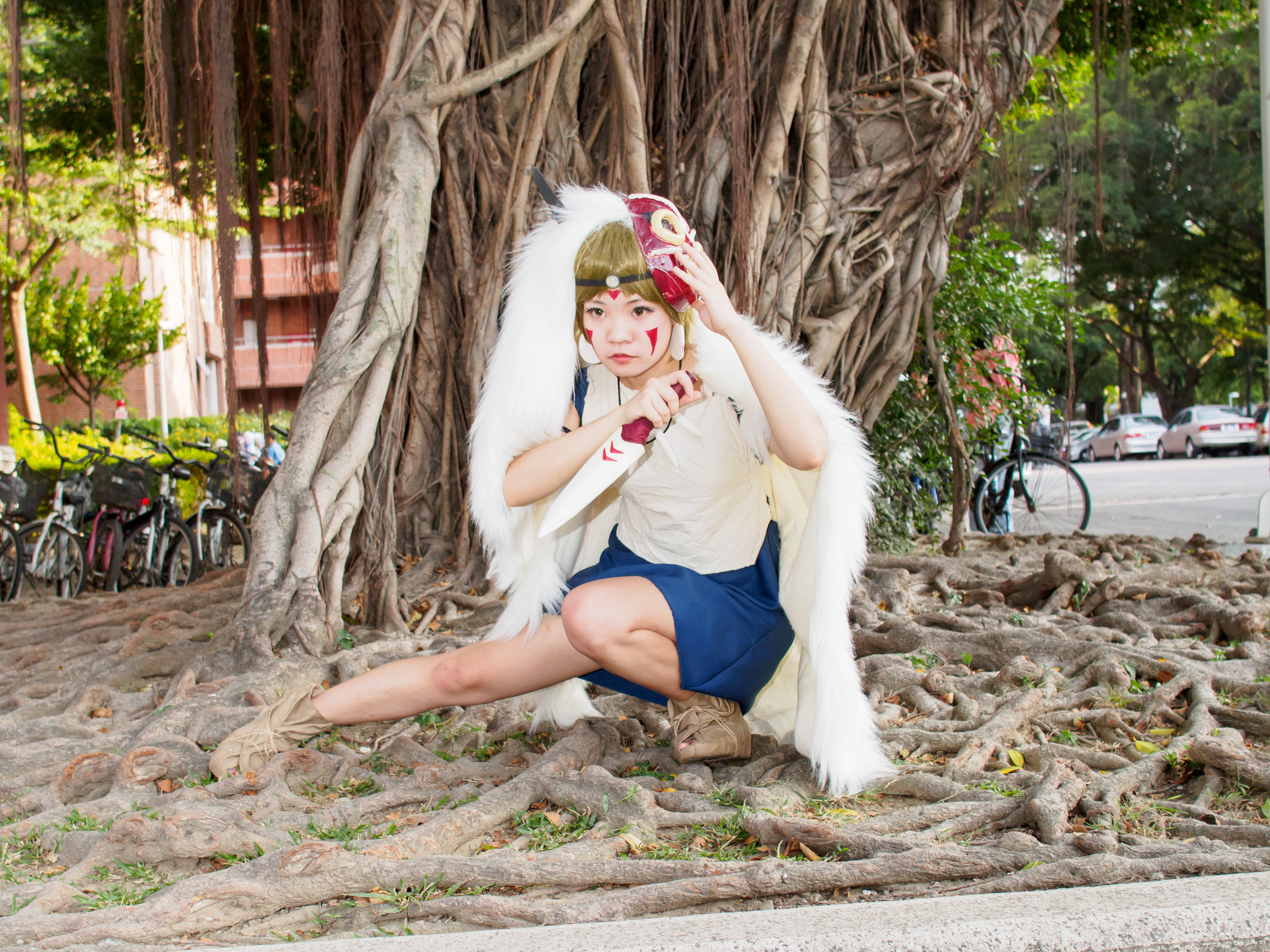 2015年成大瓊華月同人誌展，《魔法公主》小桑cosplayer。